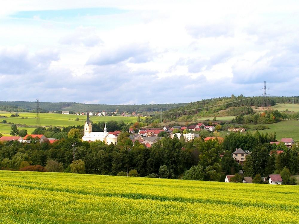 Pohled z Koukolek